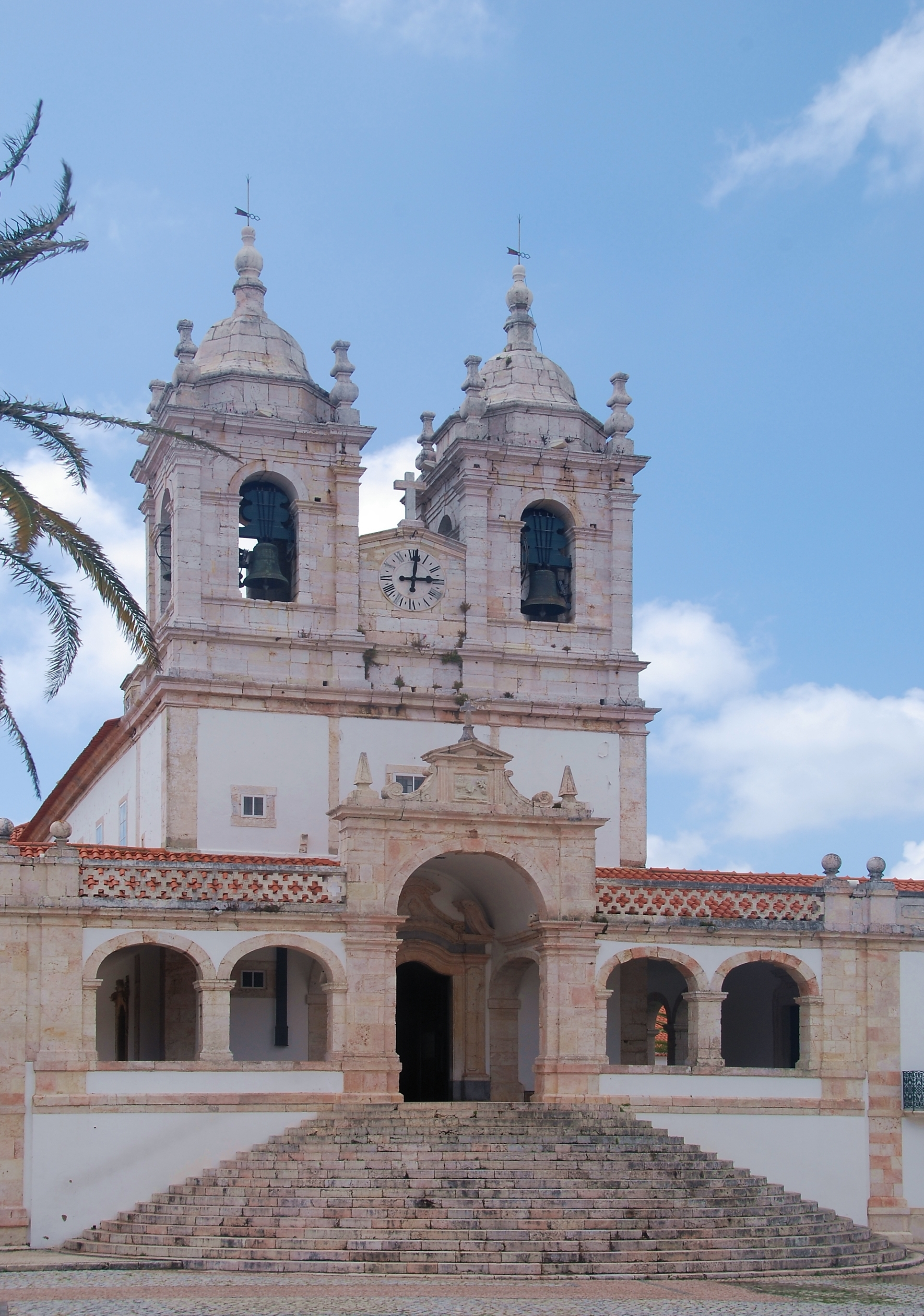 The curch of Nossa Senhora da Nazaré (Our Lady of Nazaré), Nazaré, Portugal